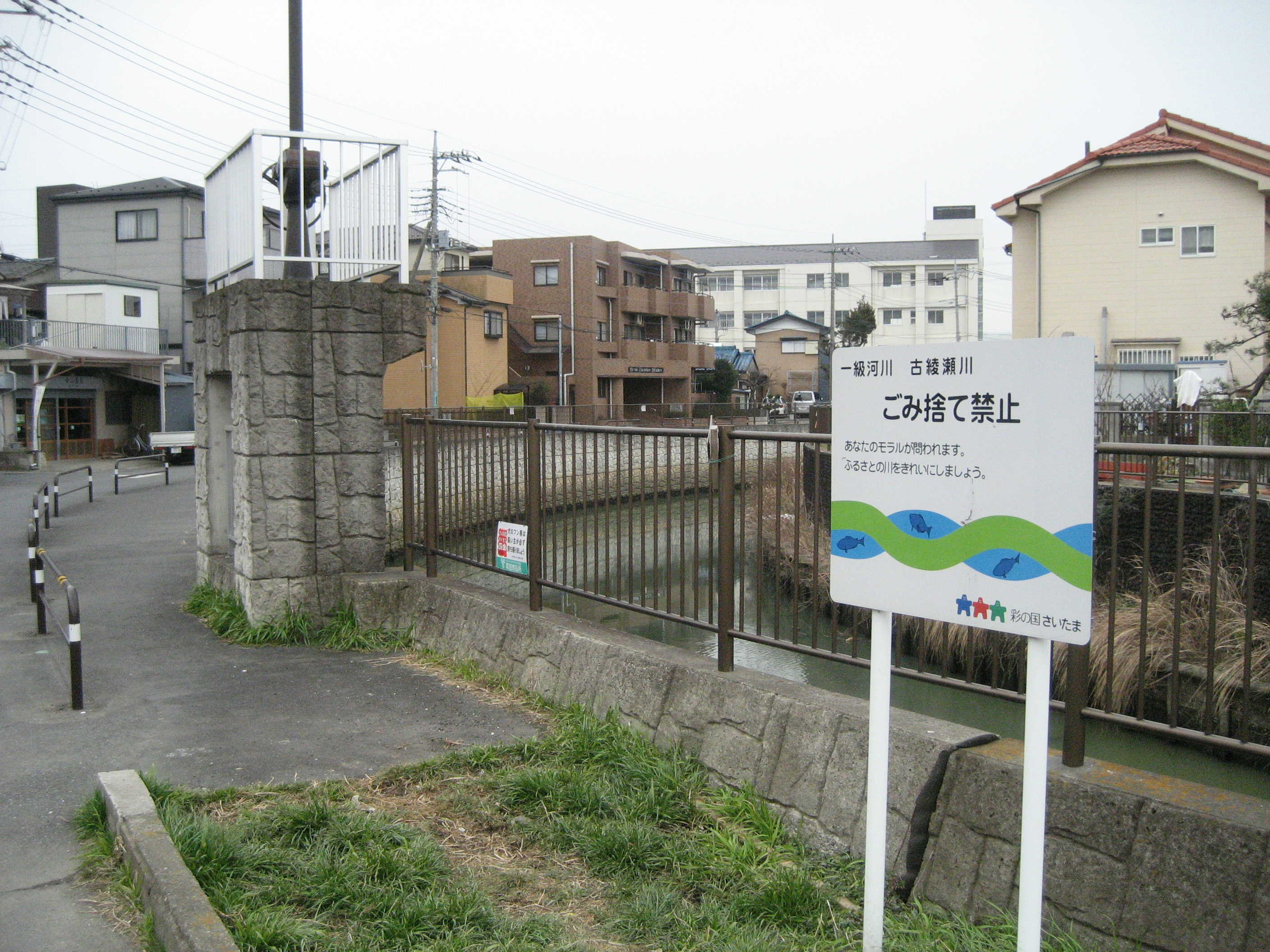 古綾瀬川（草加市青柳）